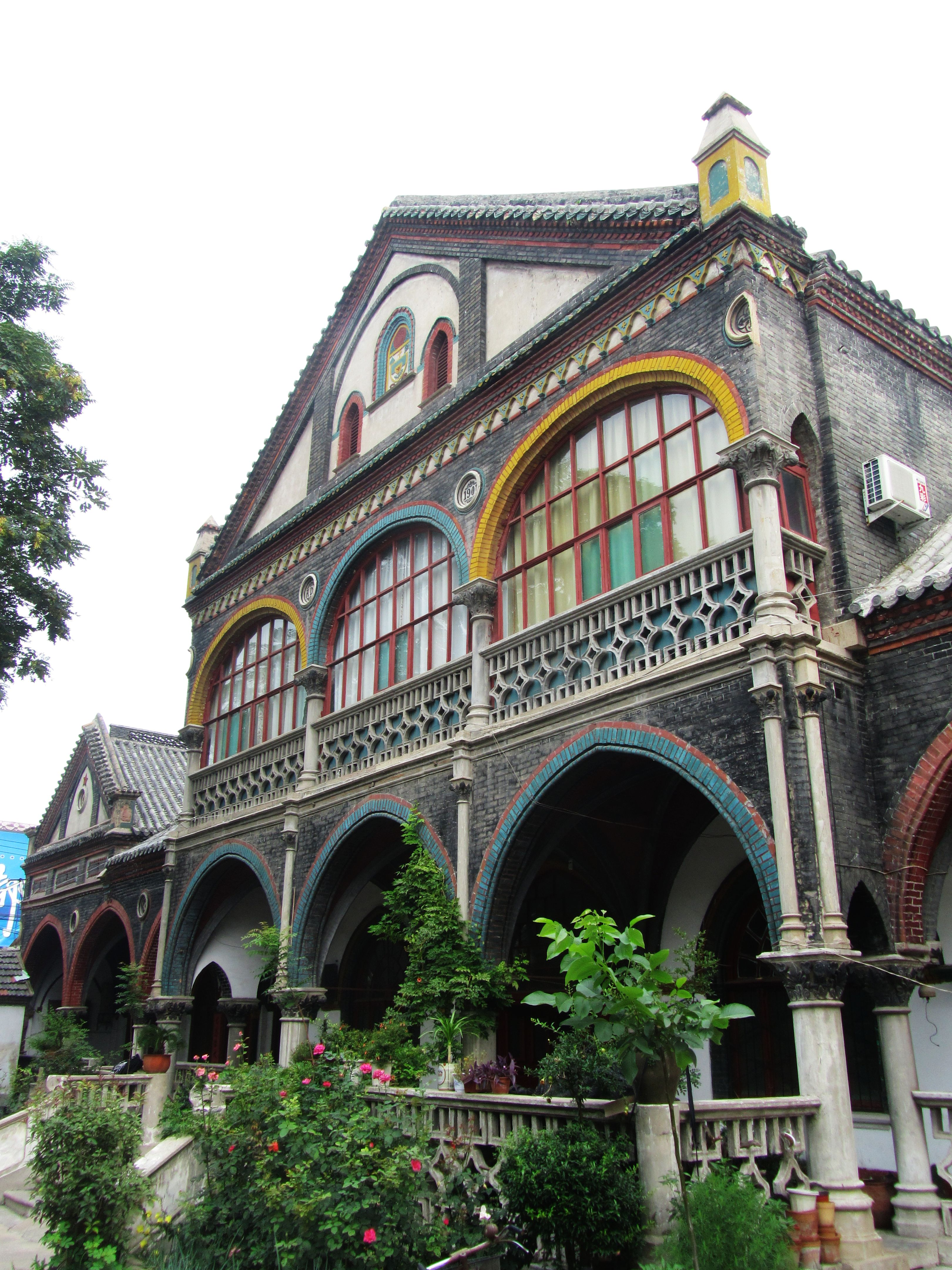 兖州天主教堂（原主教府）南面。